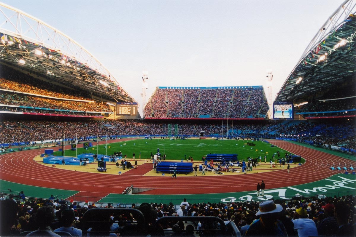 Homebush stadium